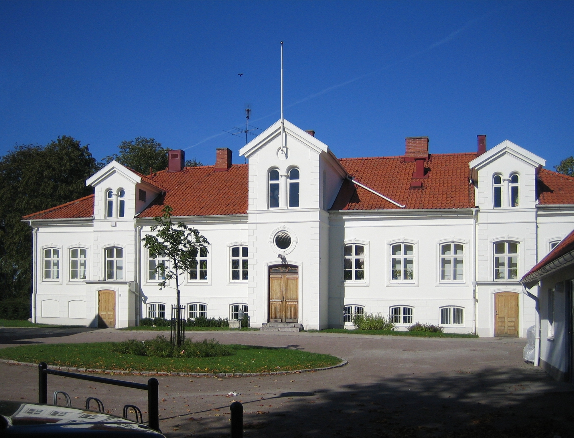 The manor in Rosengård, Malmö, Sweden